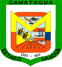 Escudo del municipio Camatagua. Estado Aragua. Venezuela